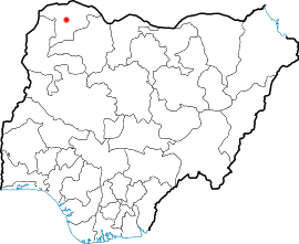 Localização de Sokoto na Nigéria.